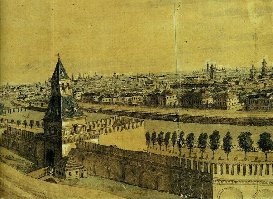 Фрагмент панорамы «Вид Замоскворечья с Кремлёвской горы», снятой губернским секретарём Калашниковым в 1807 г.